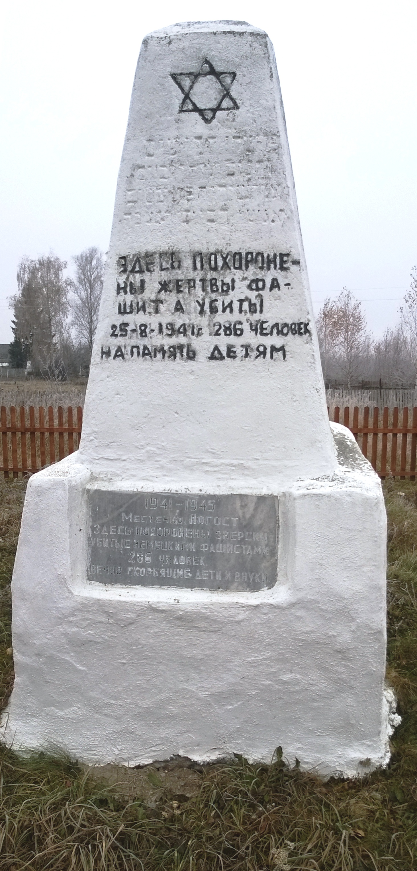 Один из двух памятников евреям - узникам гетто в деревне Погост Солигорского района, убитым во время Холокоста.